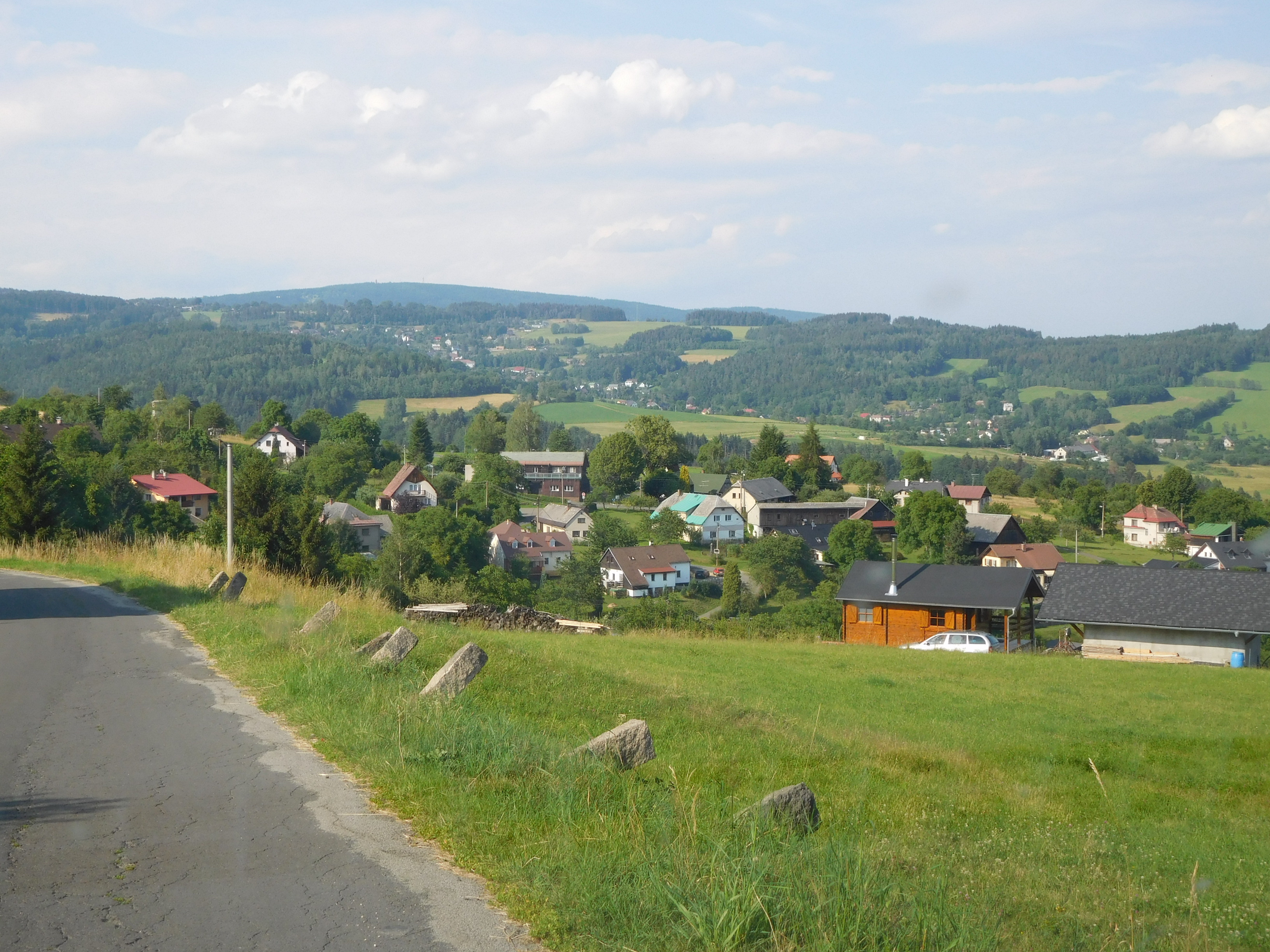 Sněhov - celkový pohled od jihovýchodu